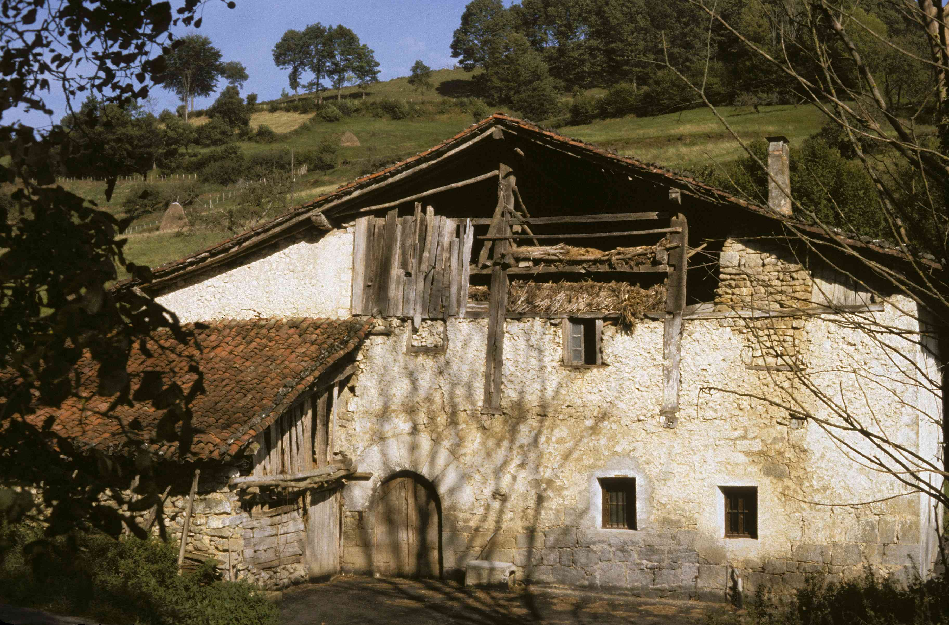 Bidania-Goiatzeko Ilunbe baserria 1987an, eraberritze lanak egin baino lehen.